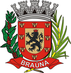 Brasão do município de Braúna, São Paulo. Emerson